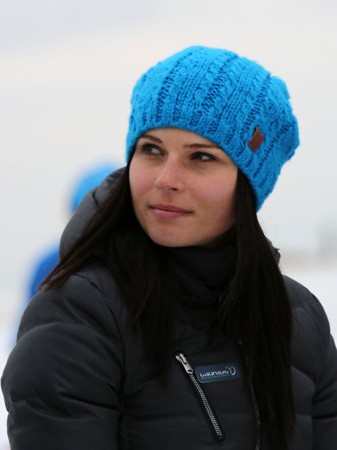 Mit FRANZ KLAMMER, HERMANN MAIER, THOMAS MUSTER, FELIX GOTTWALD und KATHI WÖRNDL ENGAGIERT sich ANNA FENNINGER als LAUREUS Botschafterin.